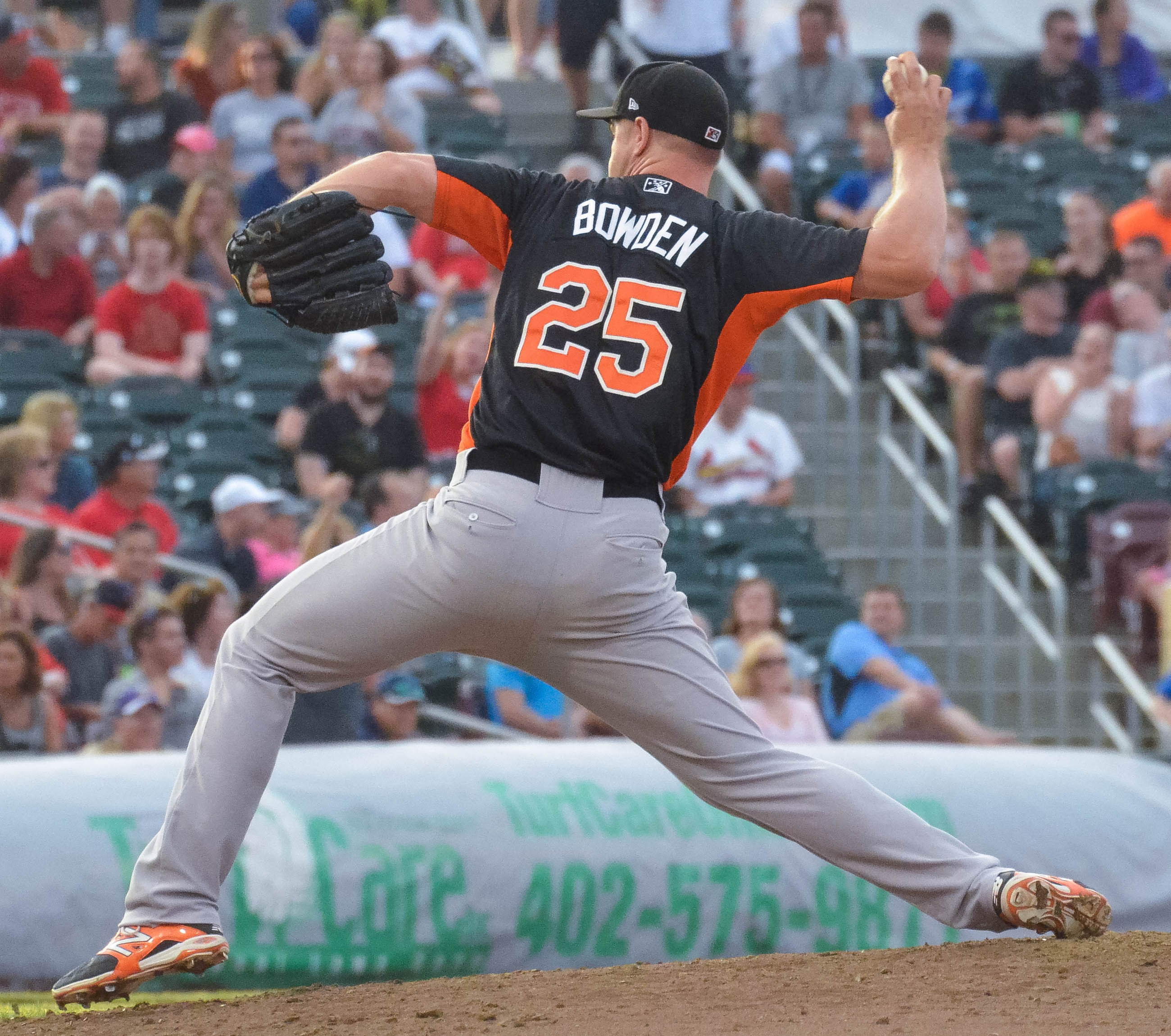 Michael Bowden